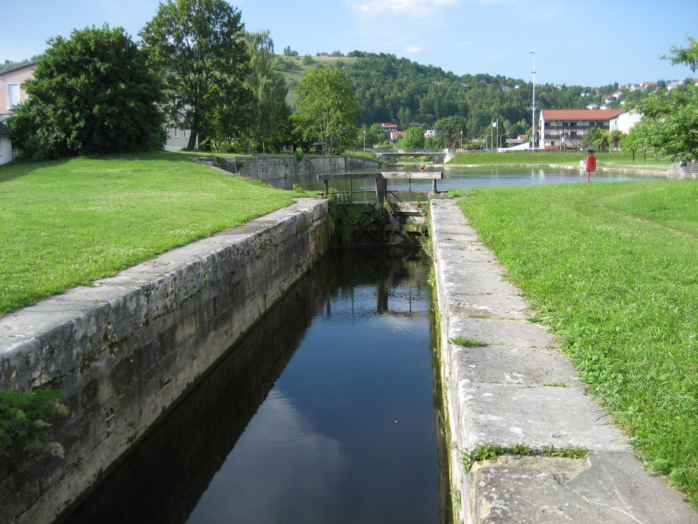 Der Kelheimer Hafen des Ludwigs Kanal und Schleuse (Richtung: Kanal aufwärts).